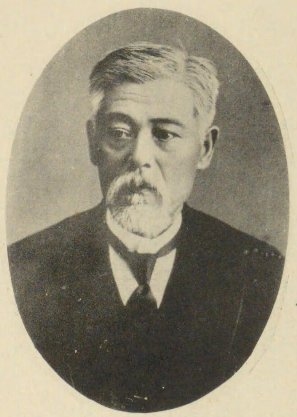 富田鐵之助